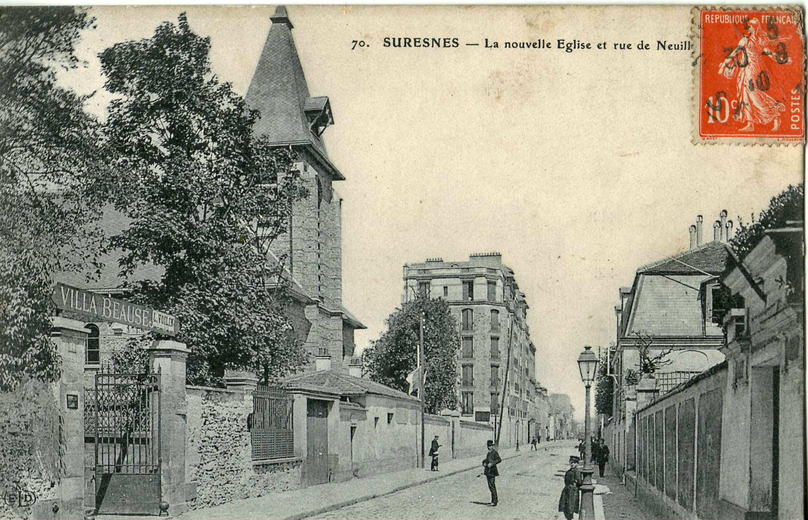 Carte postale ancienne éditée par ELD, n°70 :SURESNES - La nouvelle église et rue de Neuilly